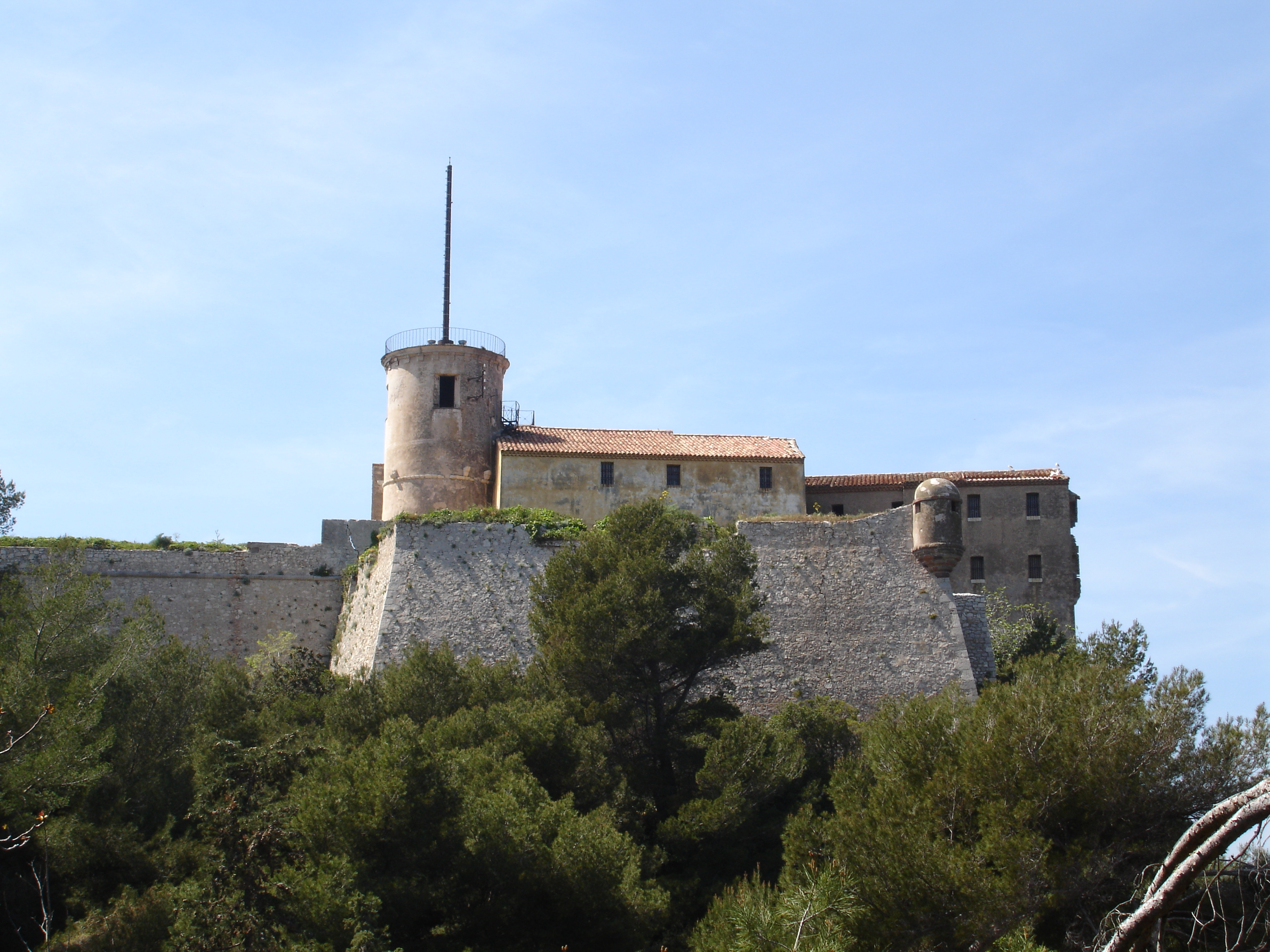 Fortification sur l'île Sainte-Marguerite au large de Cannes / Fortress on île Sainte-Marguerite off shore from Cannes